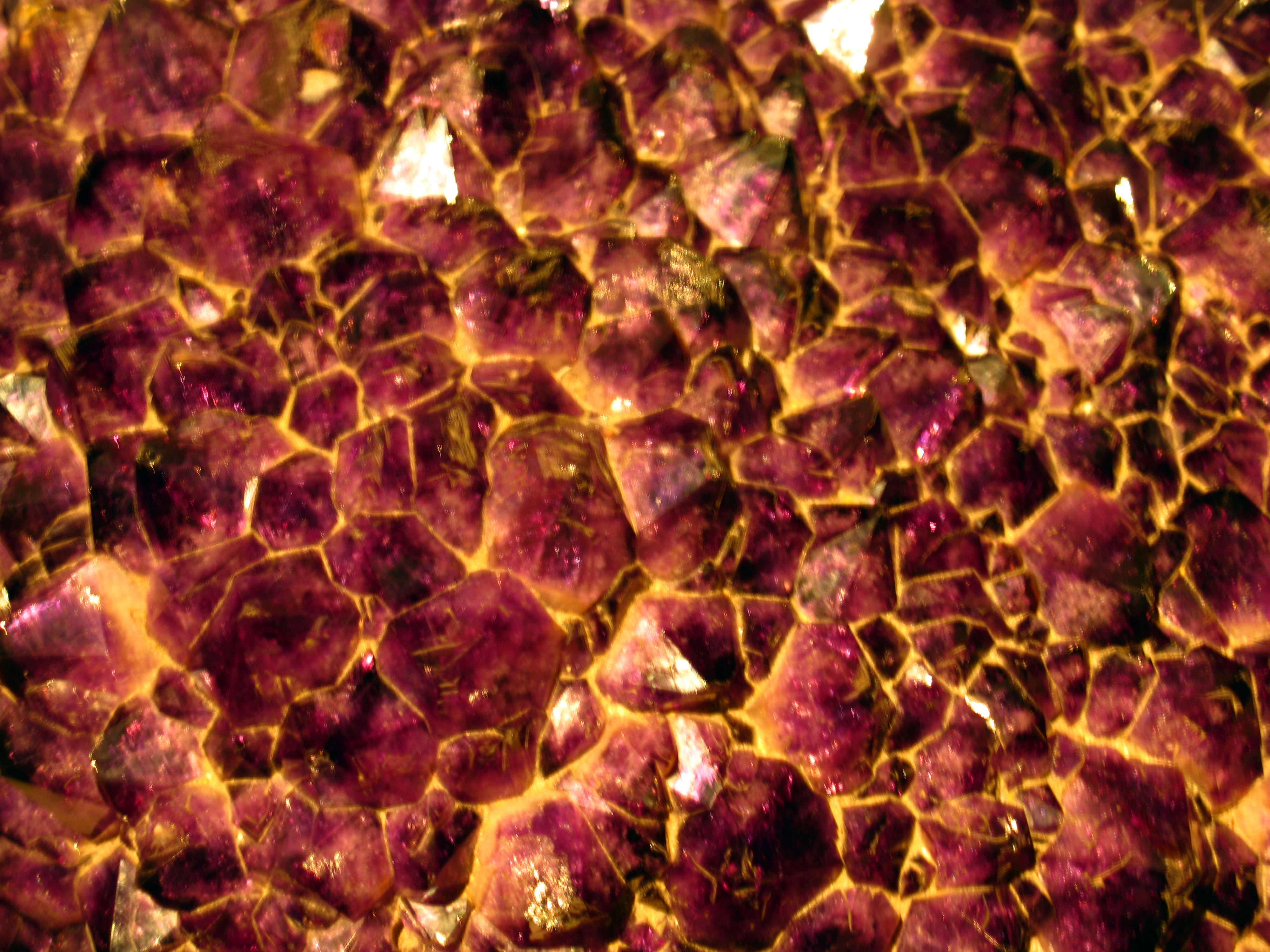 Amethyst SiO2 Serra do Mar, Rio Grande do Sul, Brazil